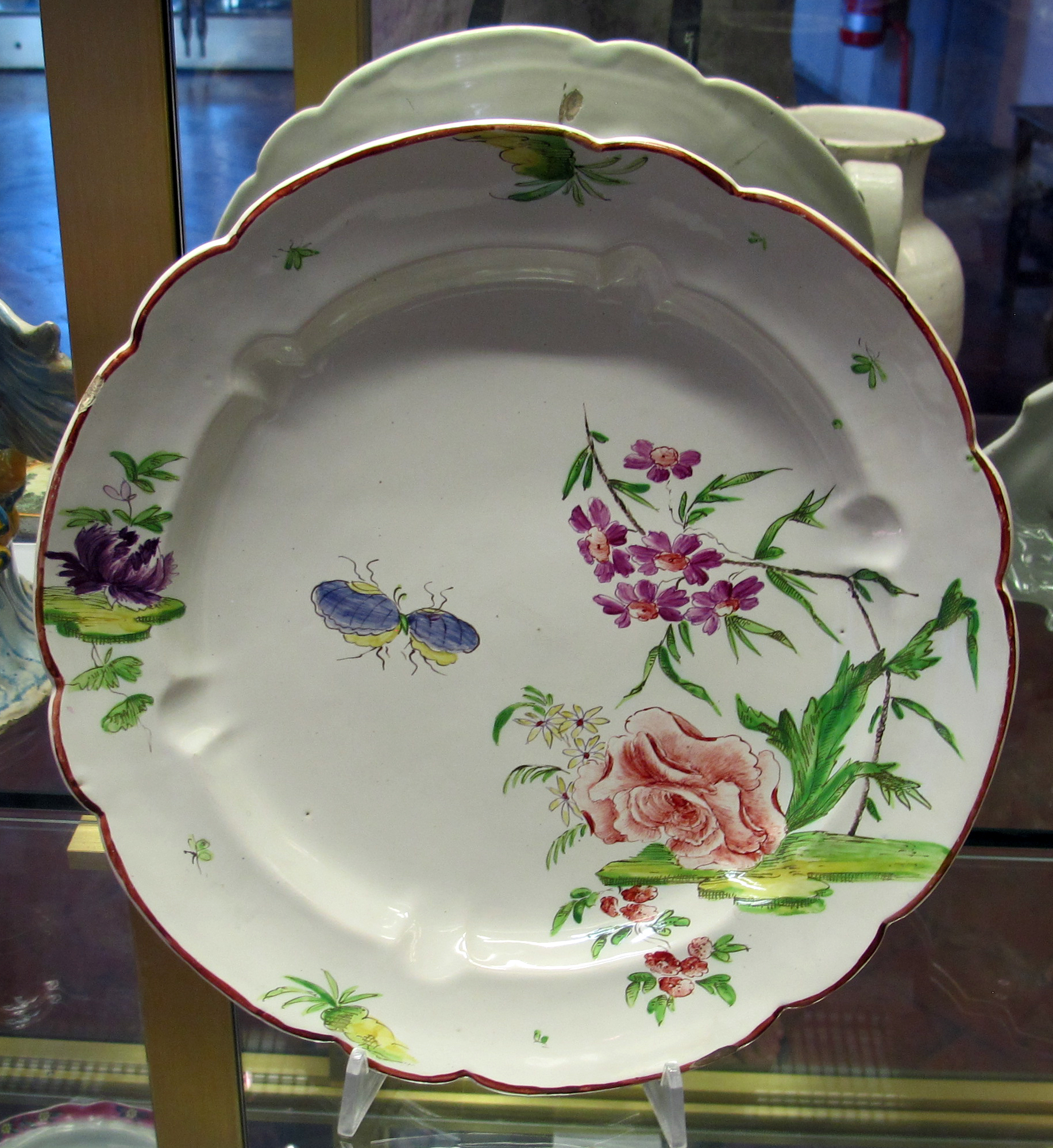 Venezia, manifattura g.cozzi, piatto da portata, 1769-1790 ca.